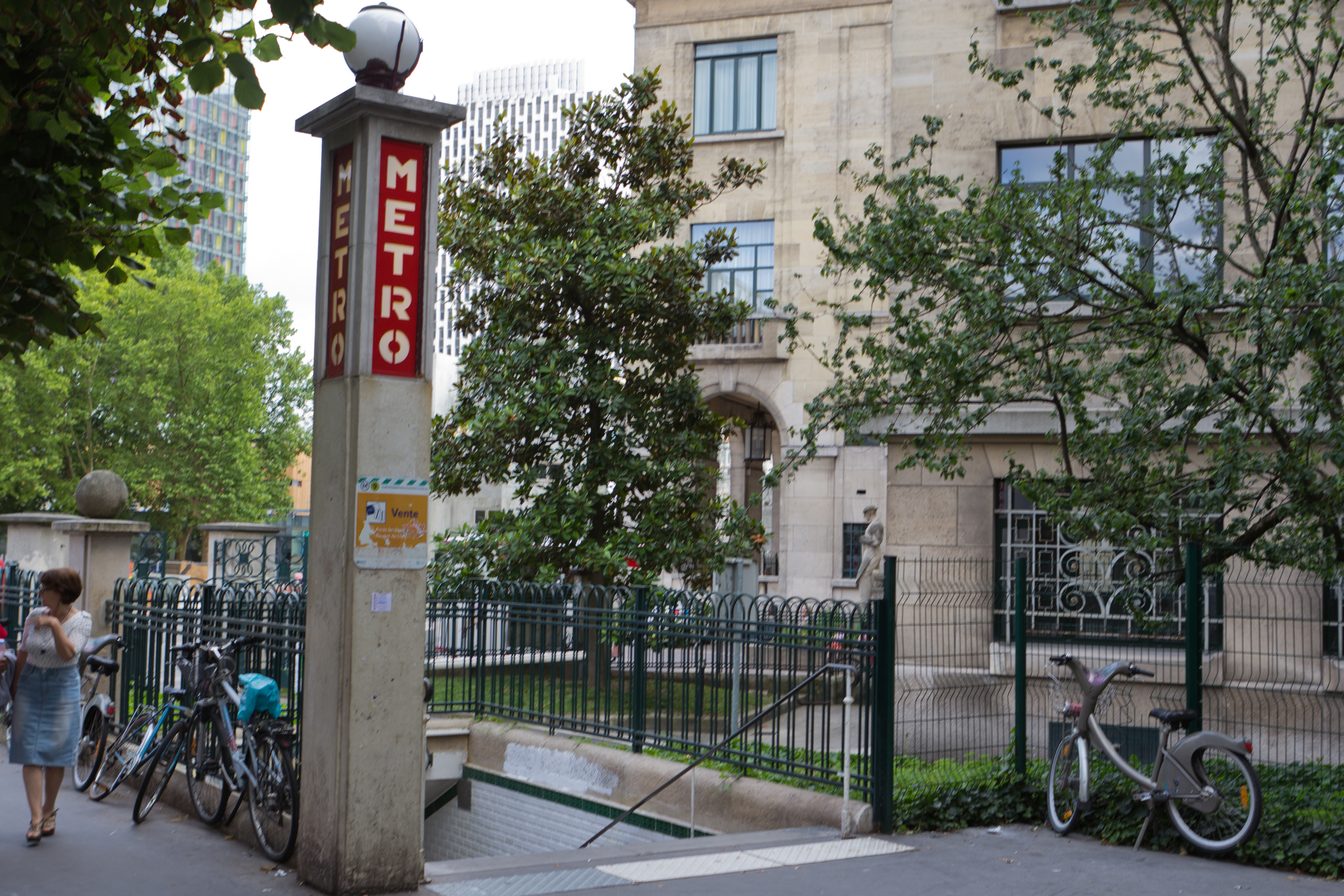 Station de métro Mairie-de-Montreuil, ligne 9 du métro de Paris (accès principal depuis l'avenue-Pasteur), Montreuil, Seine-Saint-Denis, France